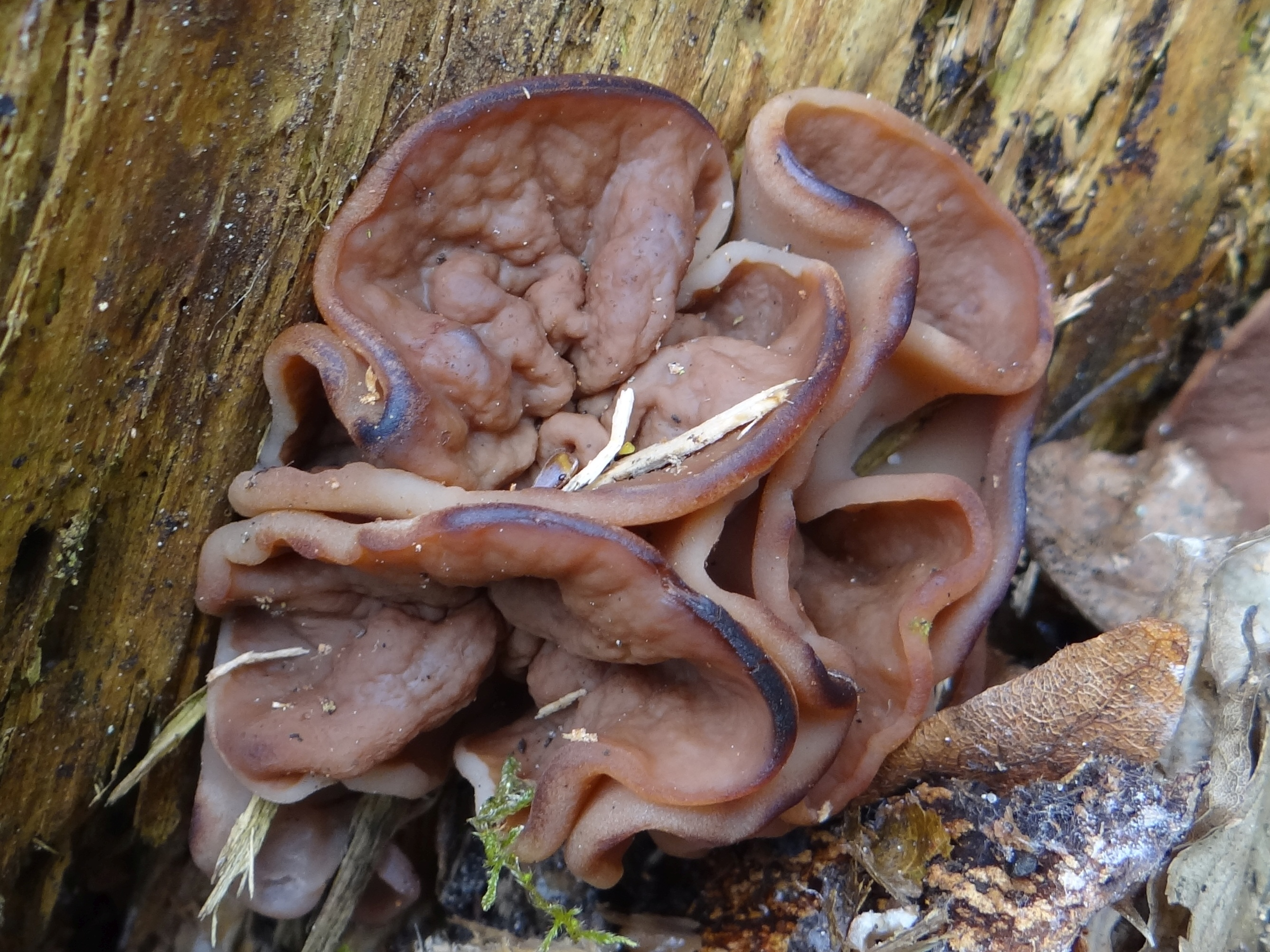 Discina ancilis. Location: Poland, Puszcza Białowieska